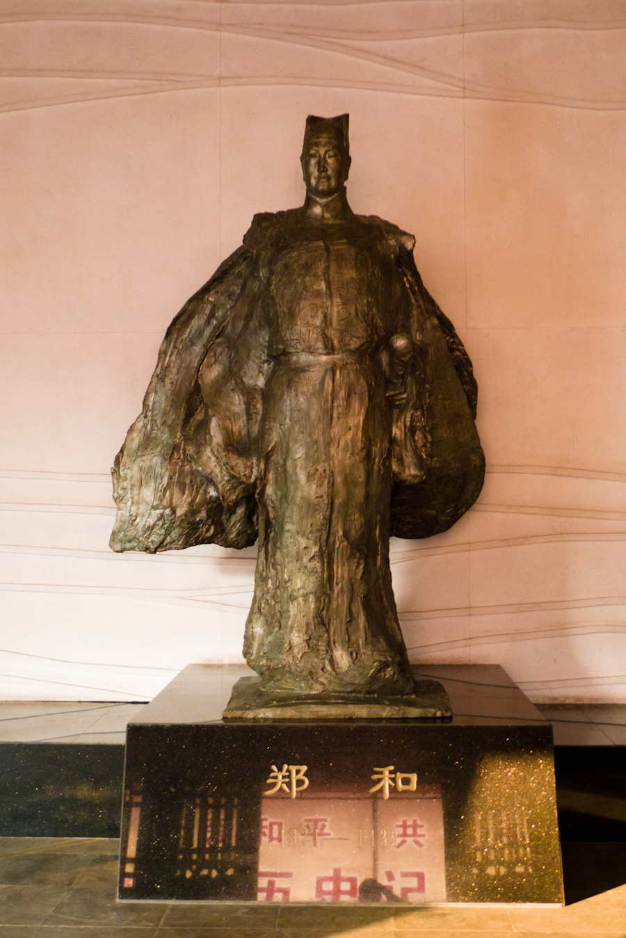 25 Nov., pm: Jinghaisi Memorial